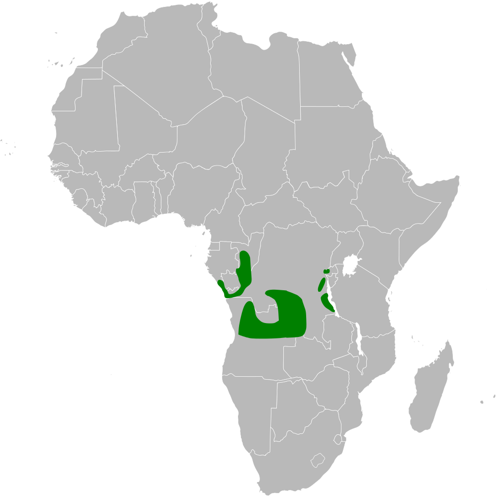 Neolestes torquatus distribution map, based on